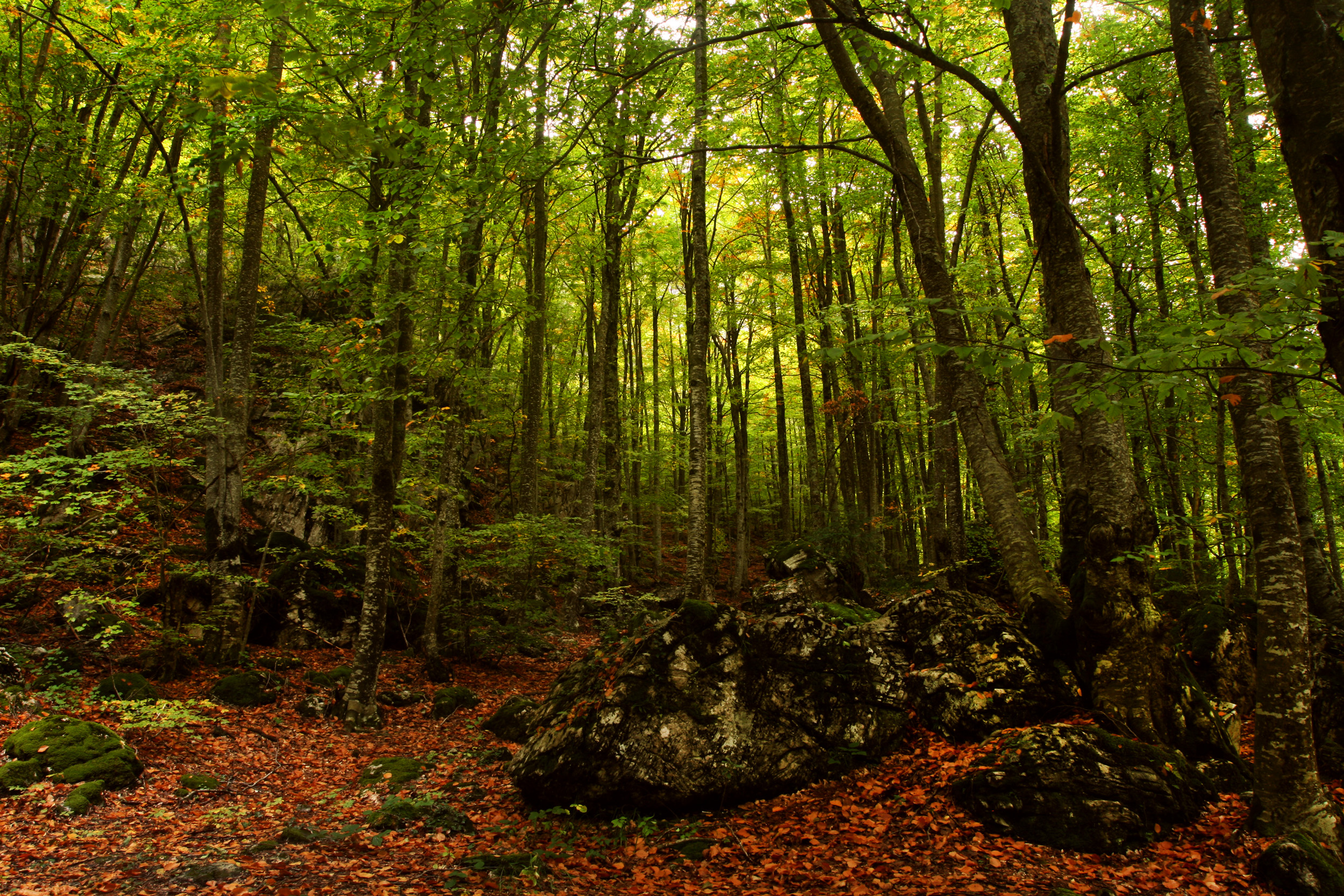 Το μονοπάτι από τα Πριόνια προς το καταφύγιο Σπήλιος Αγαπητός This is a photography of Natura 2000 protected area with ID GR1250001